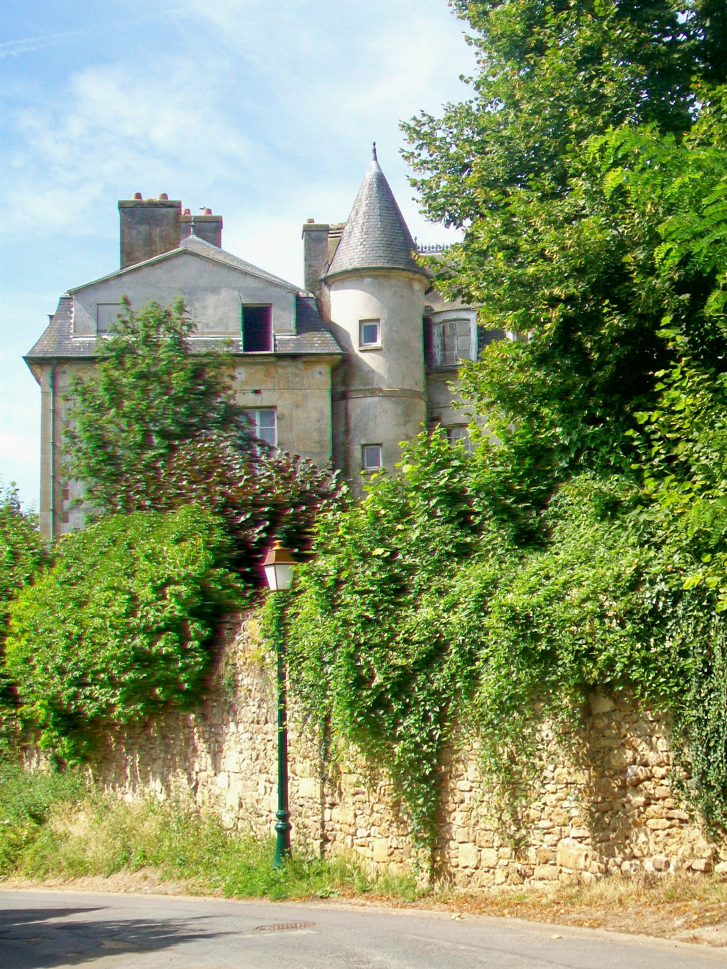 Château de Frémainville, entre la rue du Château et la rue du Pavé.